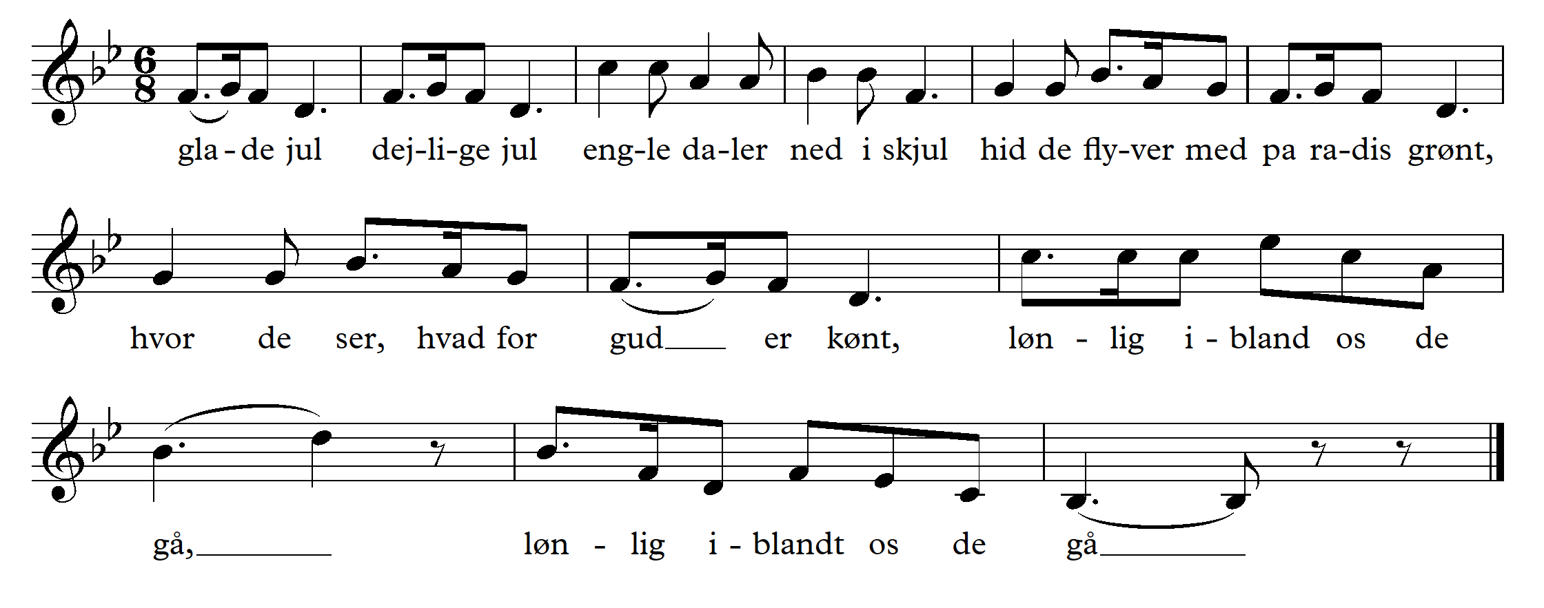 julesalme